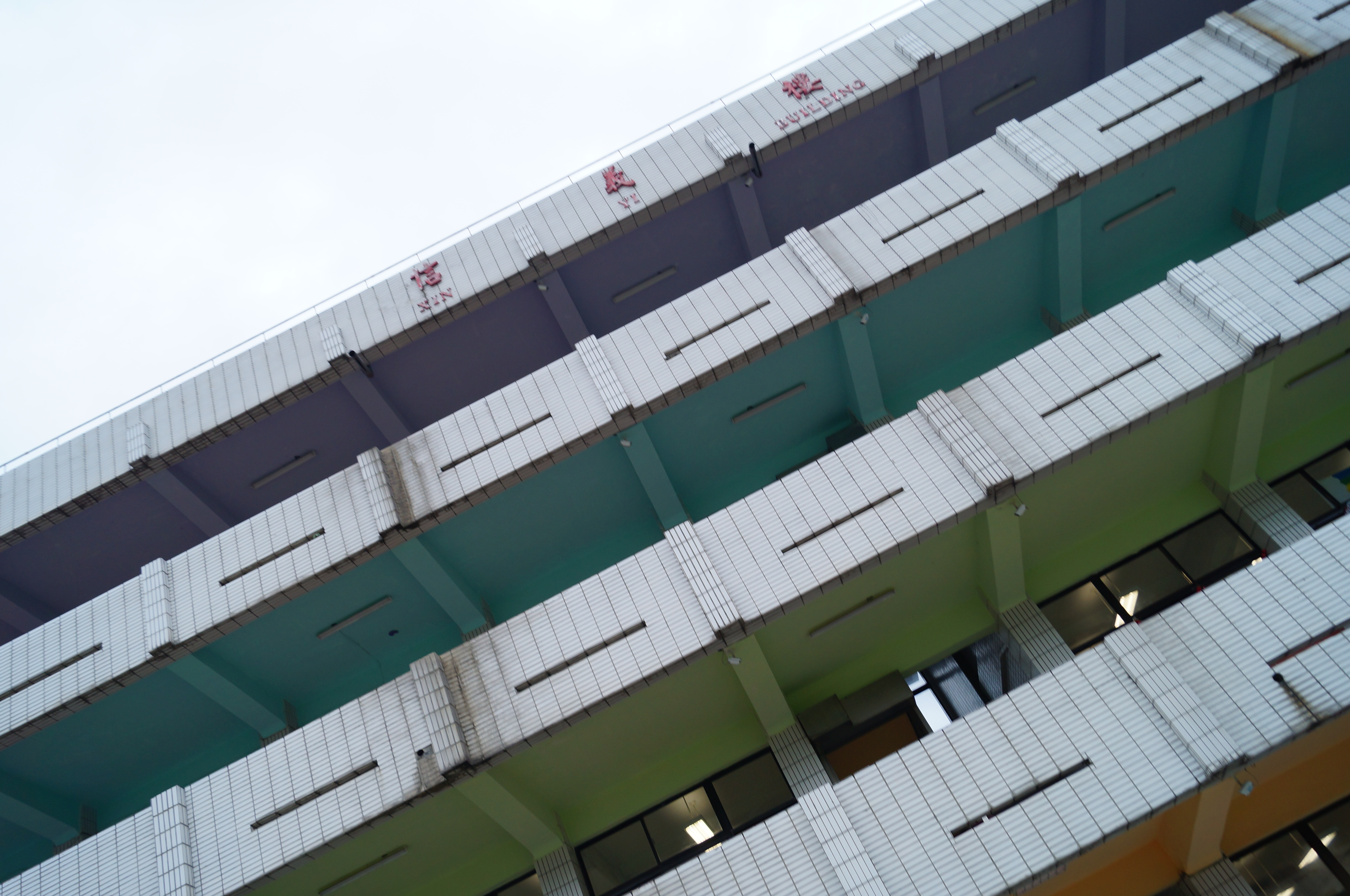 仰看滬江高中 信義樓，其內部天花板甫粉刷完畢。